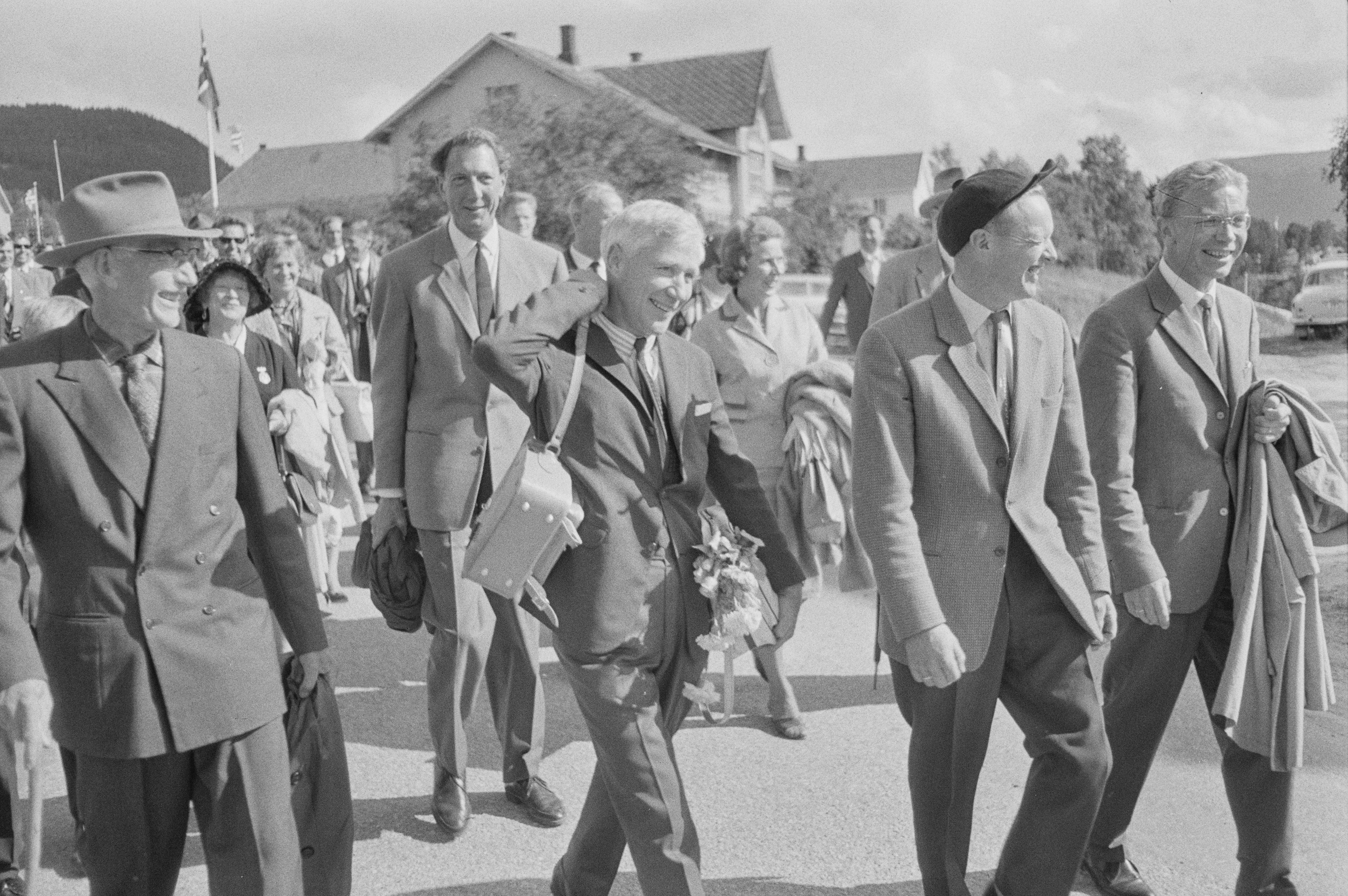 Bildet er hentet fra Arkivverket. Foto tatt i forbindelse med reportasje om den norske filmen Freske fraspark fra 1963. Manus var ved Kjell Aukrust og Bjørn Breigutu. Regi ved Bjørn Breigutu. Kjell Aukrust, Leif Juster, Turid Caldwell, Alfhild Hovdan, Per Bistrup, Lalla Carlsen Arkivinstitusjon : Riksarkivet Arkivnavn : Billedbladet NÅ Sted : Norge, Hedmark, Alvdal, Emneord: Film, Filminnspilling Avbildet